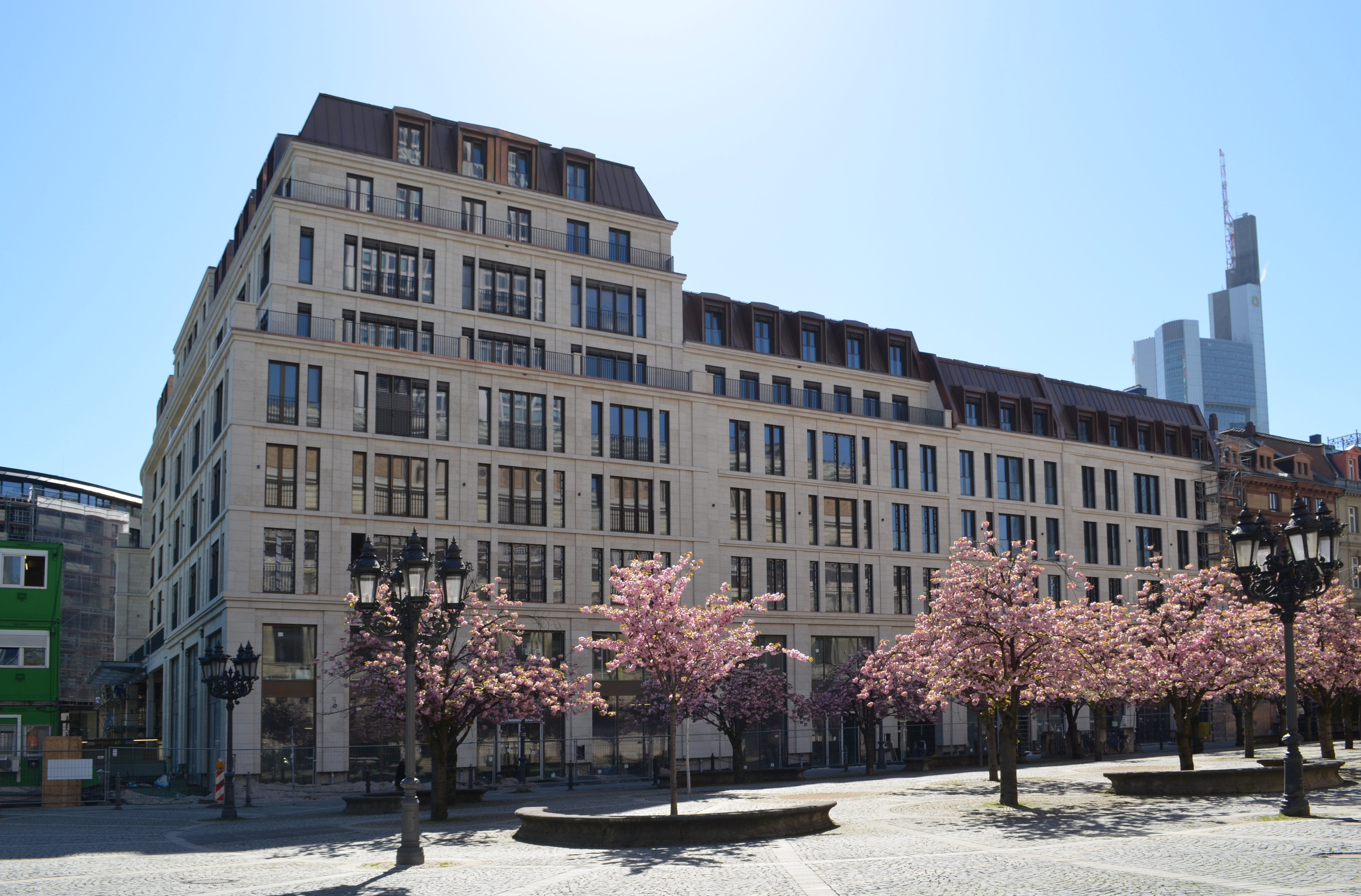 Frankfurt, Opernplatz, künftiges Sofitel Hotel